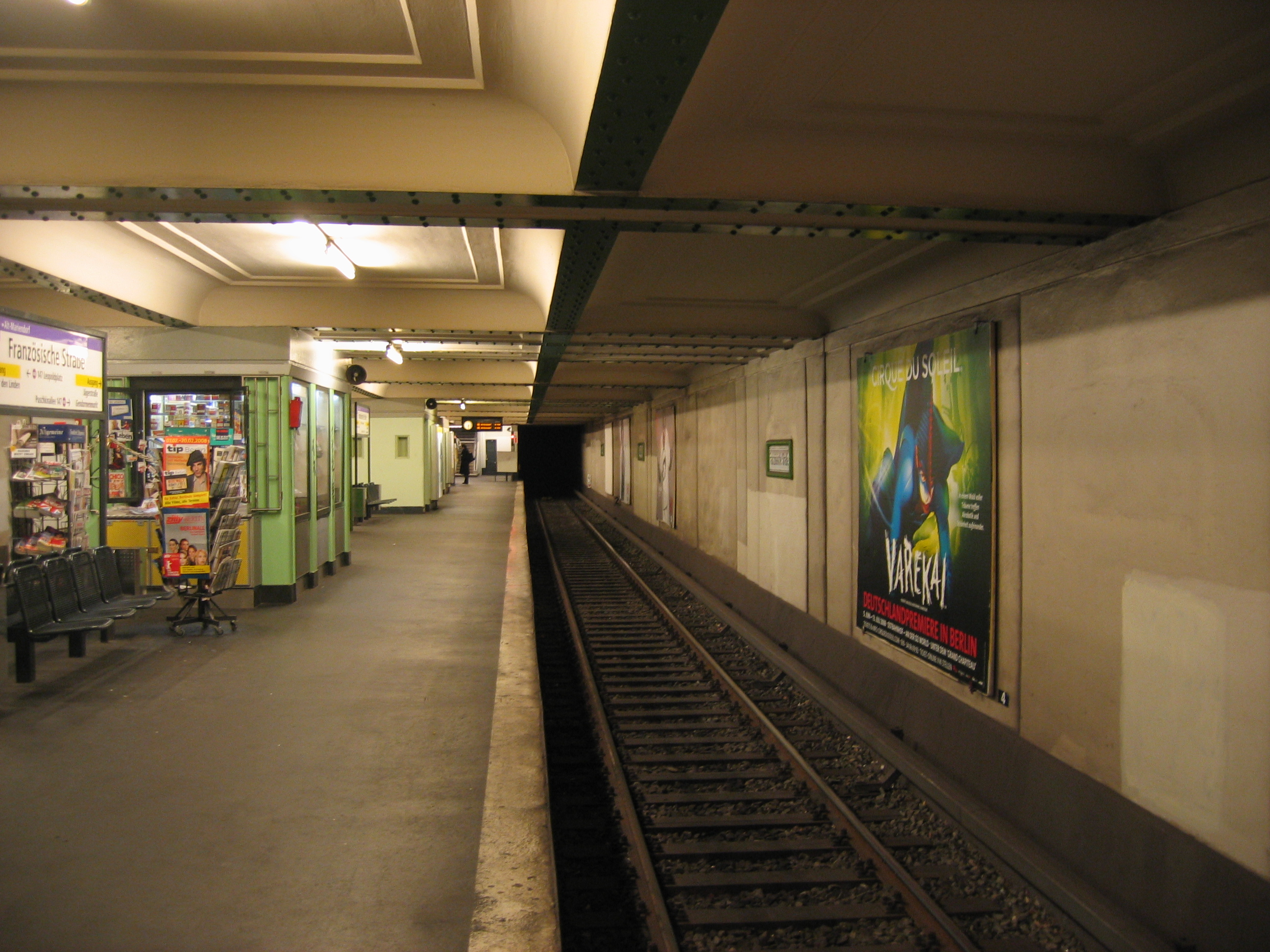 U-Bahnhof Französische Straße, Berlin